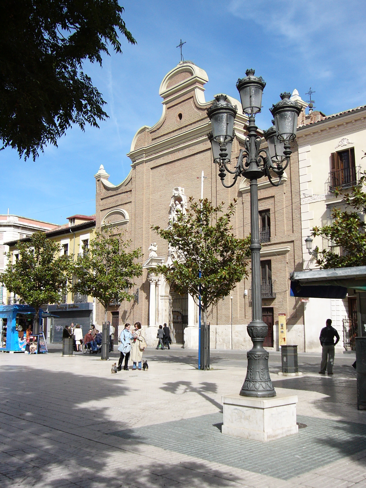 San Nicolás El Real Church, Guadalajara, Spain